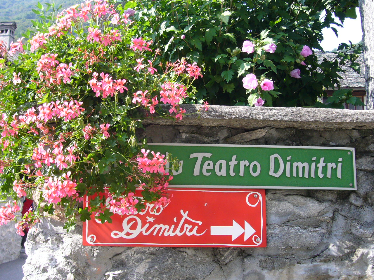 CaraaTeatro Dimitri